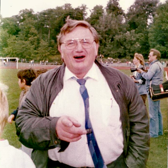 Nachdem der FC Schalke 04 am Vortag mit 2:5 gegen den HSV unterging, spielte er am Folgetag, mit Olaf Thon und Toni Schumacher, auf dem Buniamshof gegen eine Lübecker Auswahl. Der VfB Lübeck spielte auf Betreiben des Trainers am gleichen Tage woanders ein Testspiel. Nachdem die Lübecker mit 1:0 in Führung gingen, verloren sie 1:5.